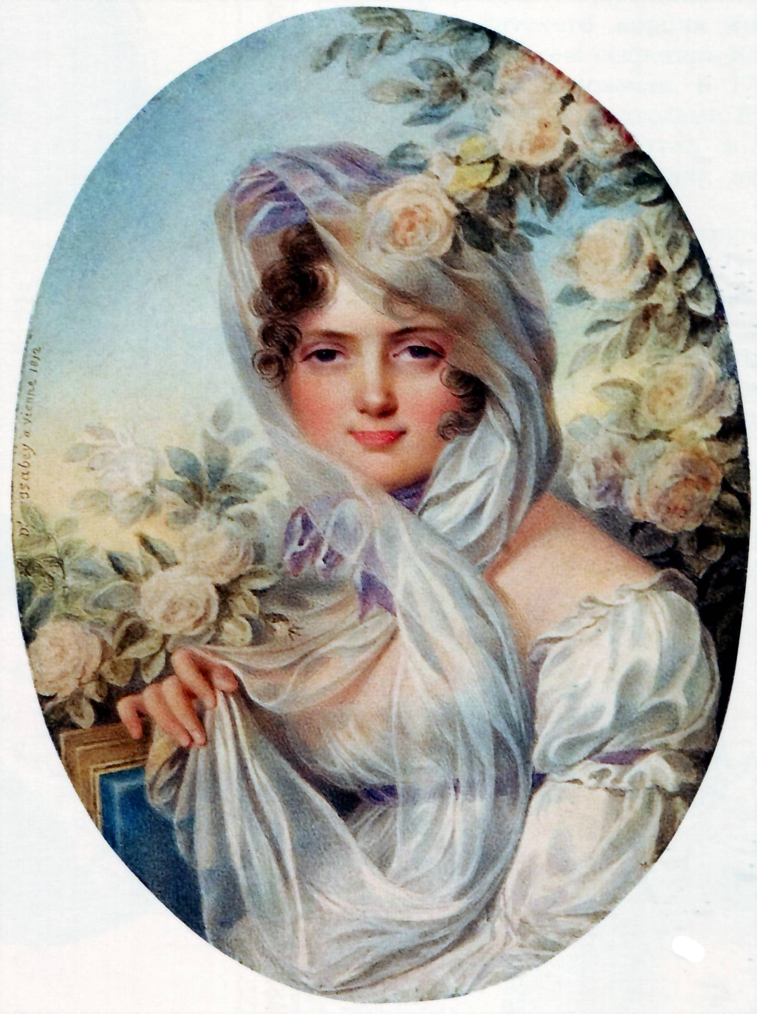 Хуммель де Бурдон Карл Людвиг (1769-1840). Портрет княгини Е.П. Багратион. 1812. Коллекция Подстаницких. Копия с акварели Изабе